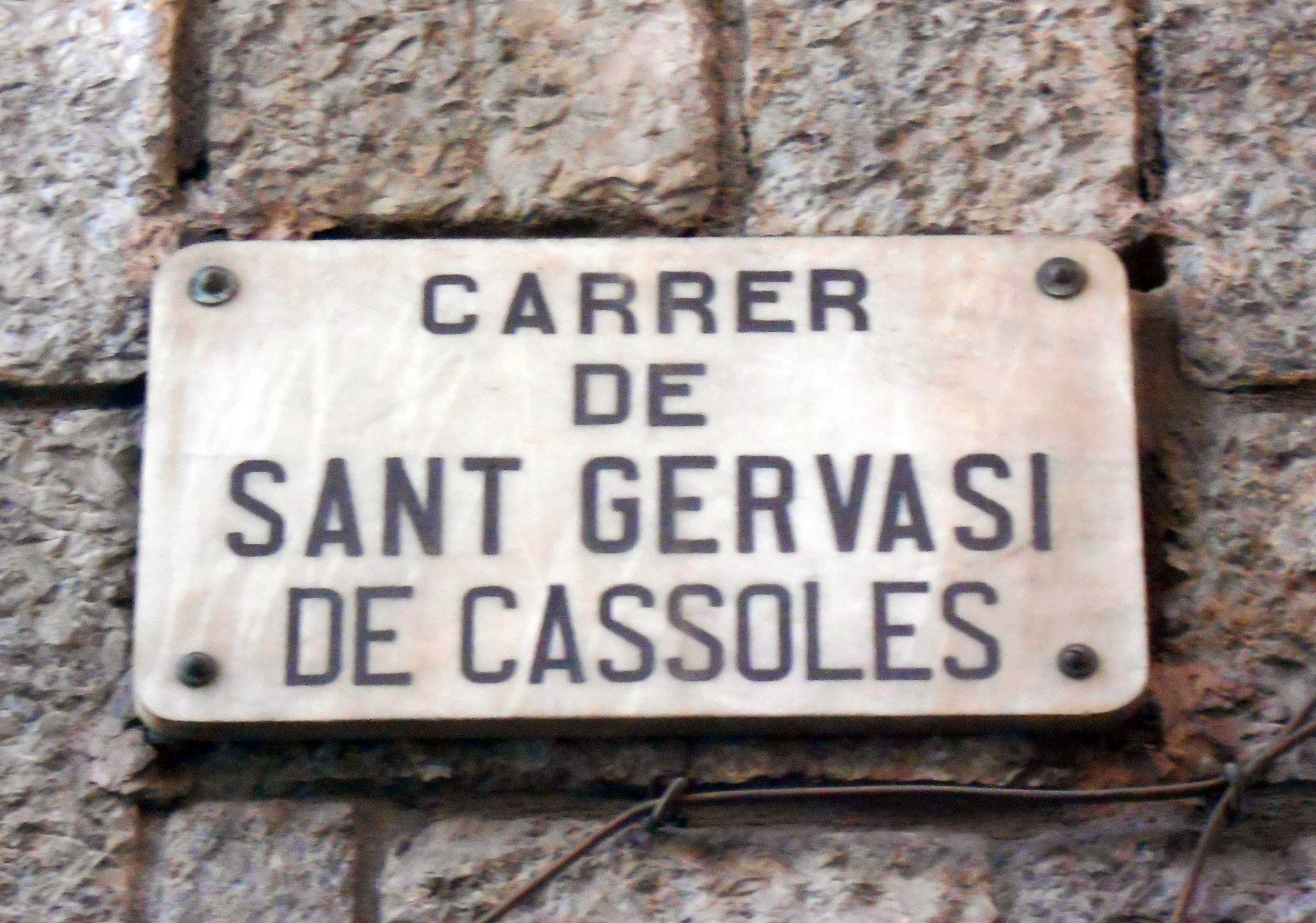 Calle de Sant Gervasi de Cassoles.